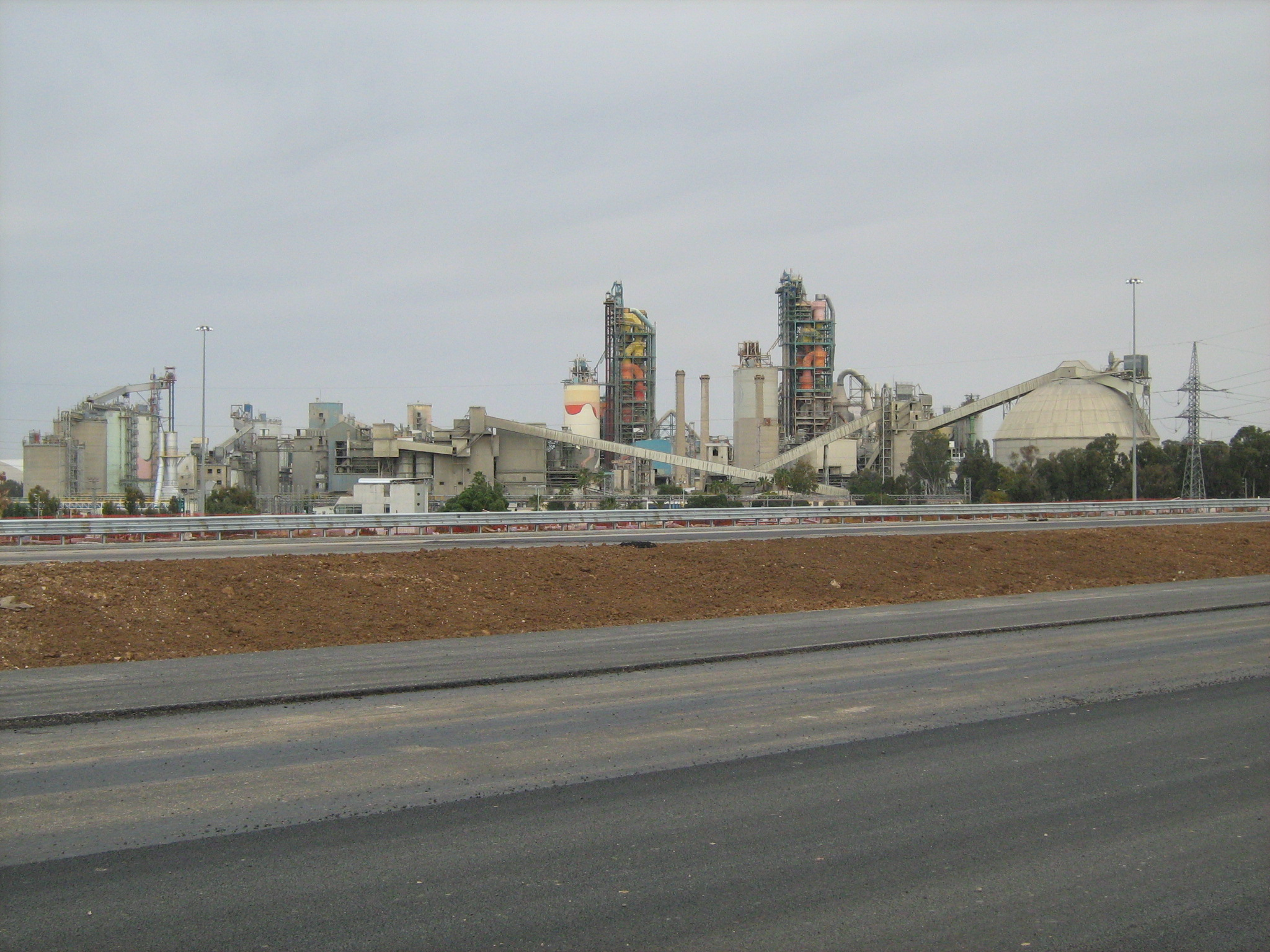 כביש 431 ומפעלי נשר ברמלה